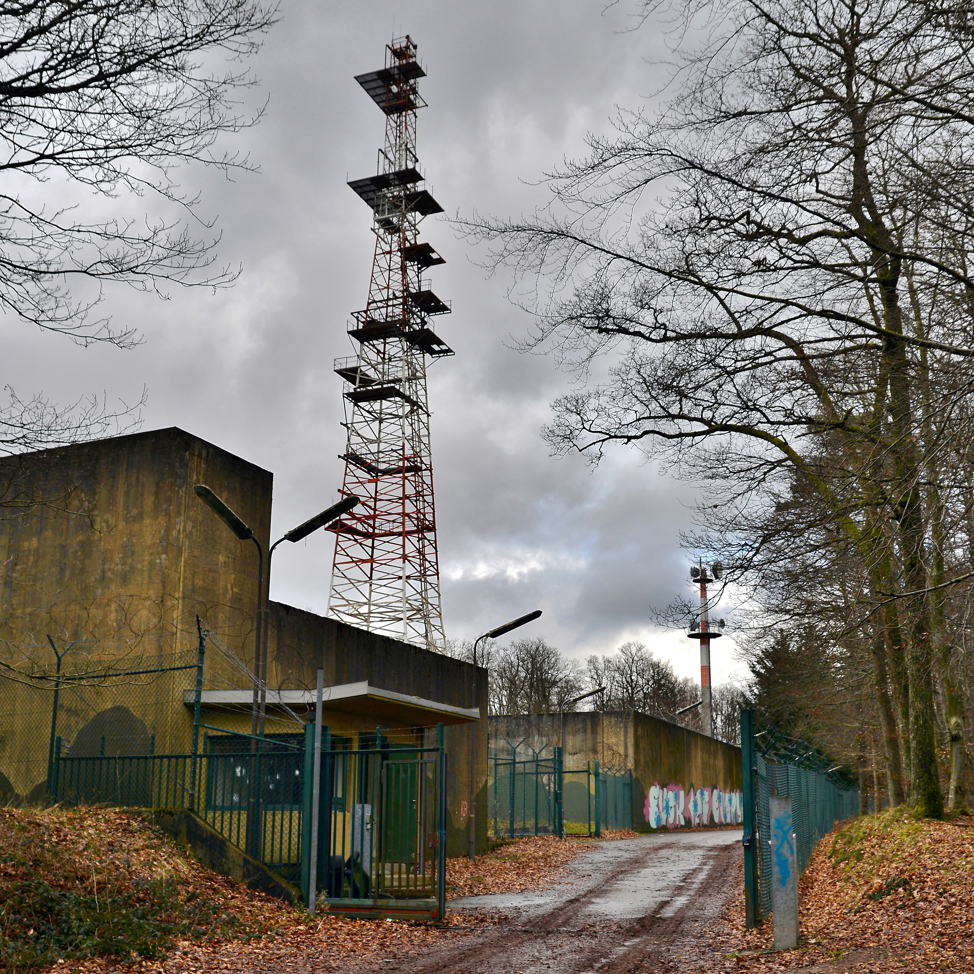 Eingang zur ehemaligen Relaisstation der U.S. Army.